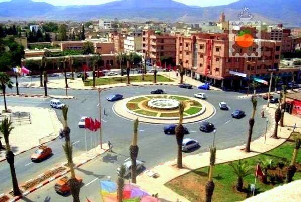 Centre ville de Berkane